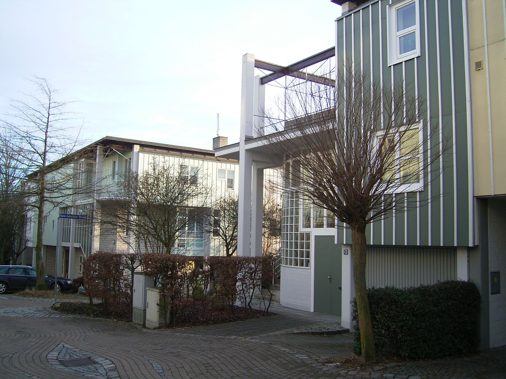 documenta urbana Wohngebäude in Kassel 1979-1982. Otto Steidle und Partner